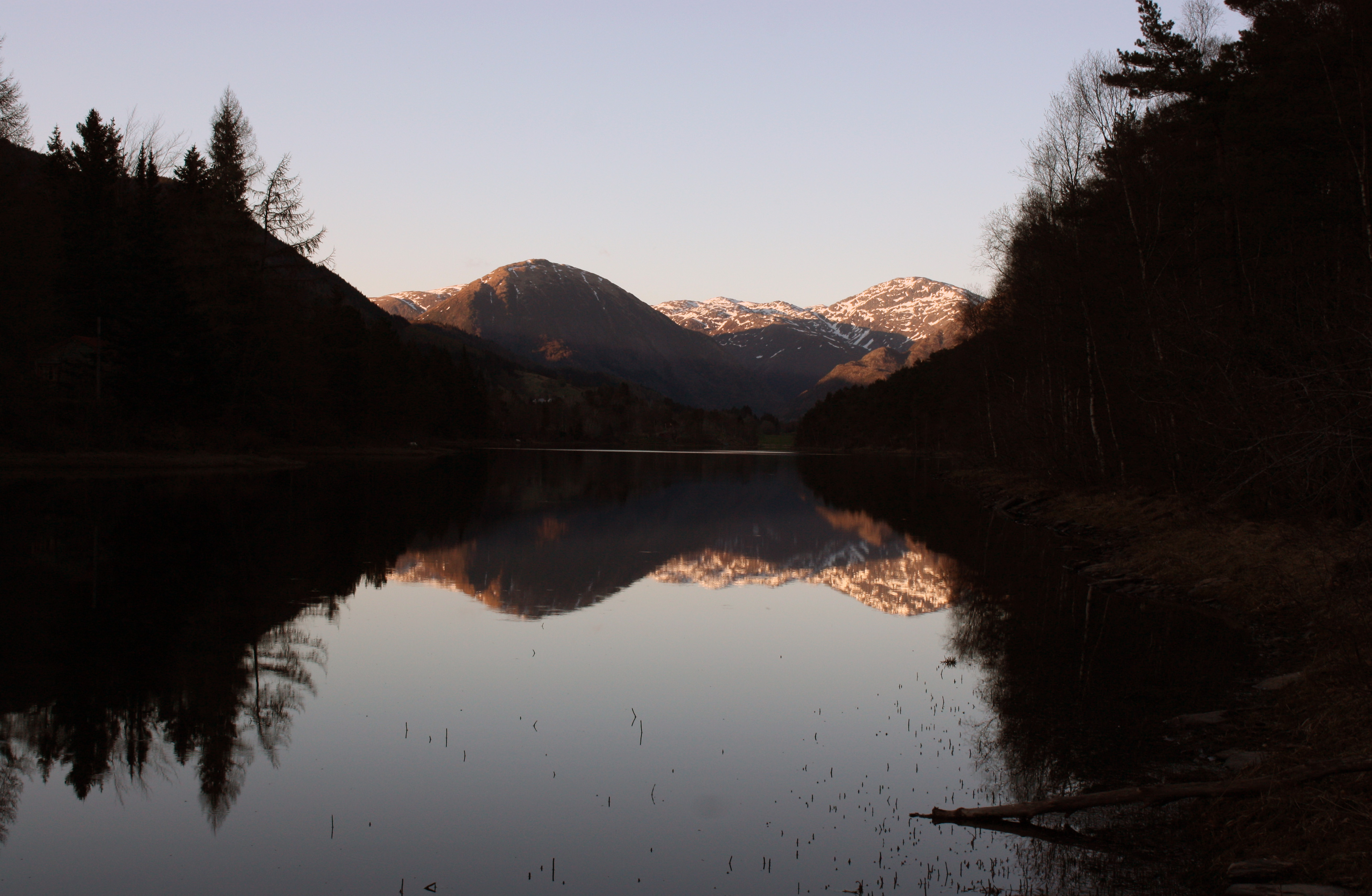 Hausdalshorga, Gullfjellet, Bergen, Norway